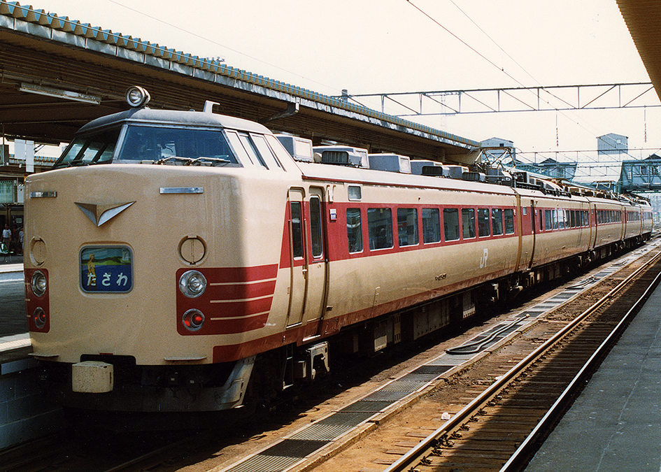 JR東日本 485系 たざわ